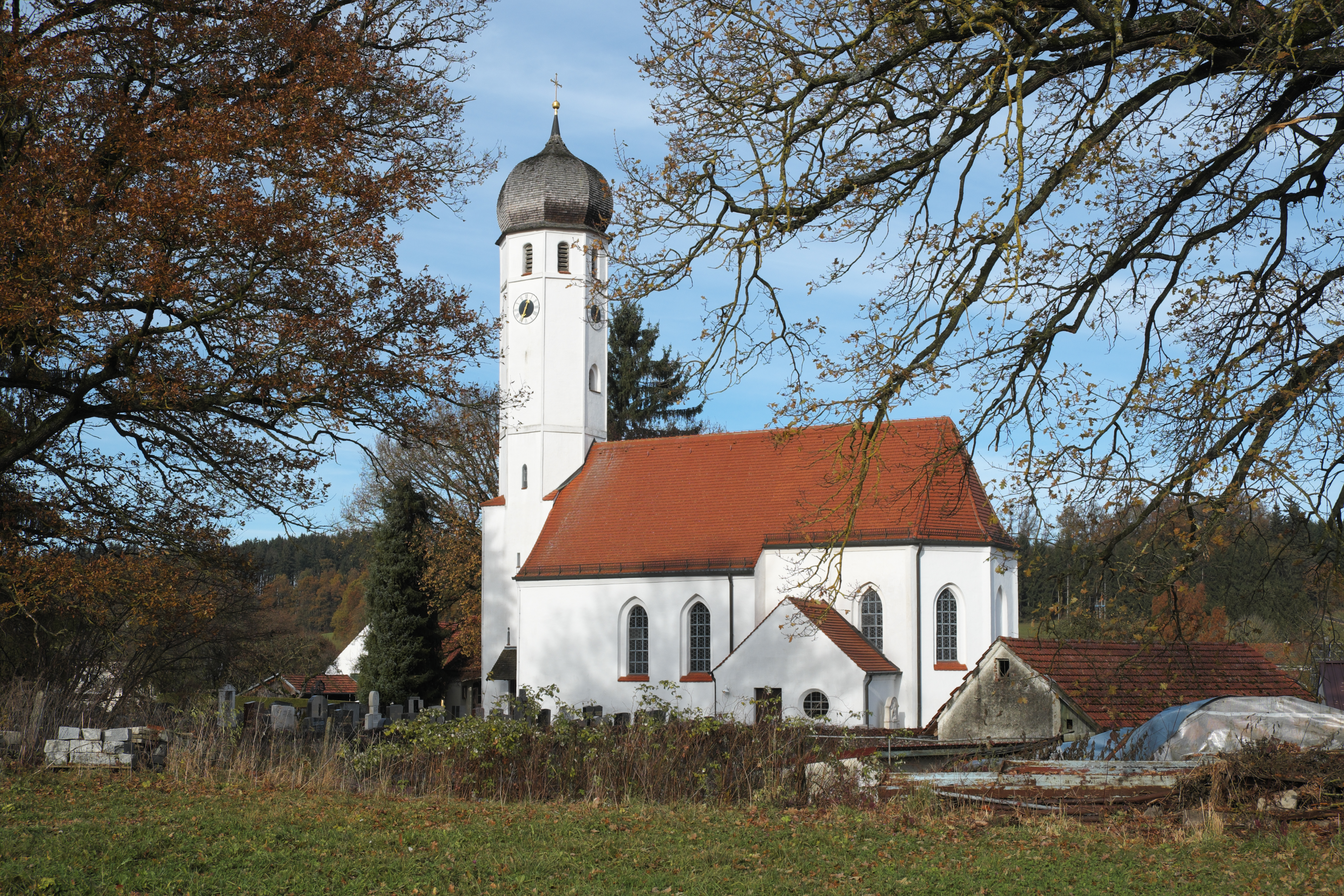 Katholische Filialkirche St. Nikolaus in Deutenhausen (Bergkirchen) im Landkreis Dachau (Bayern/Deutschland)